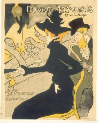 Affiche de Toulouse Lautrec, photographiée, collection de l'associaition